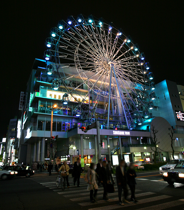 Sunshine Sakae in Nagoya.